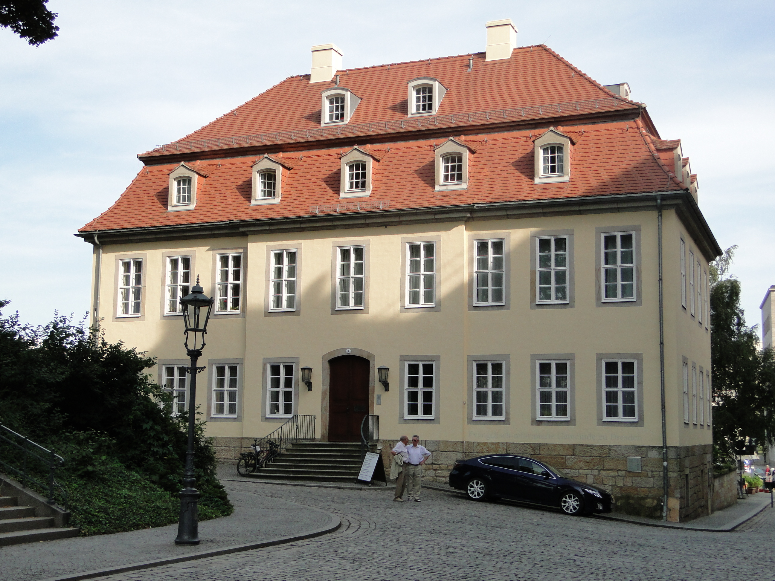 Ehemalige Hofgärtnerei, inzwischen Kirche und Gemeindehaus der reformierten Kirchgemeinde in Dresden, Brühlscher Garten 4